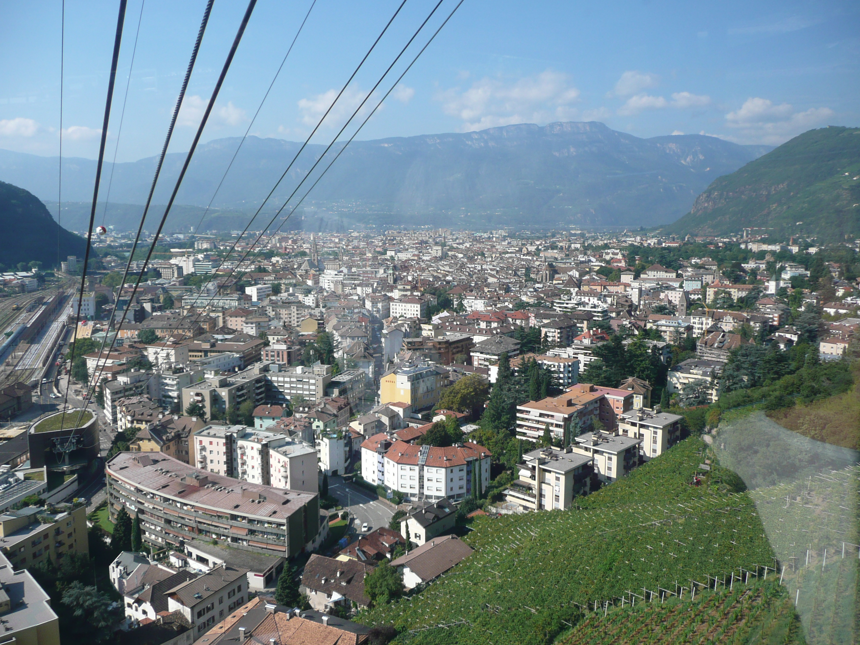 Ansicht von Bozen aus der Rittner Seilbahn aus